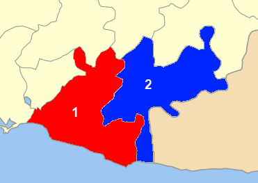 Χάρτης με τις ενότητες που αποτελούν τον Δήμο Μαρώνειας-Σαπών